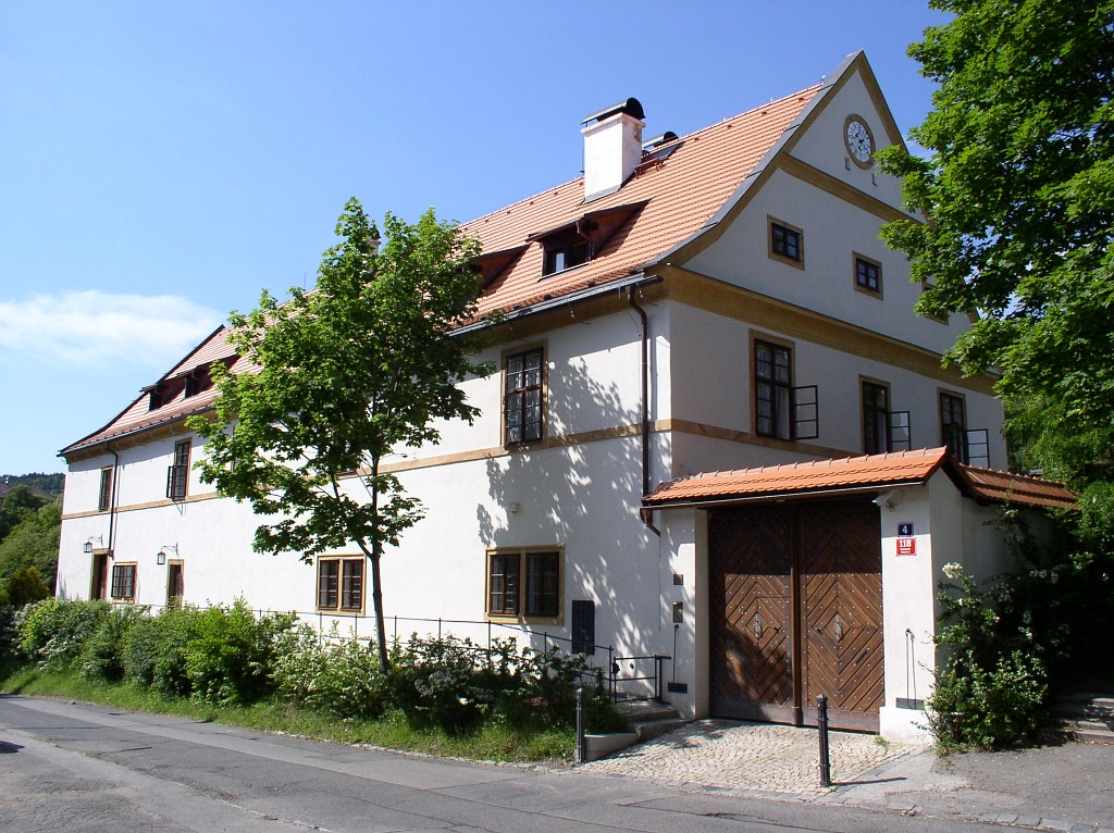 Klikovka – one of old estates in Prague